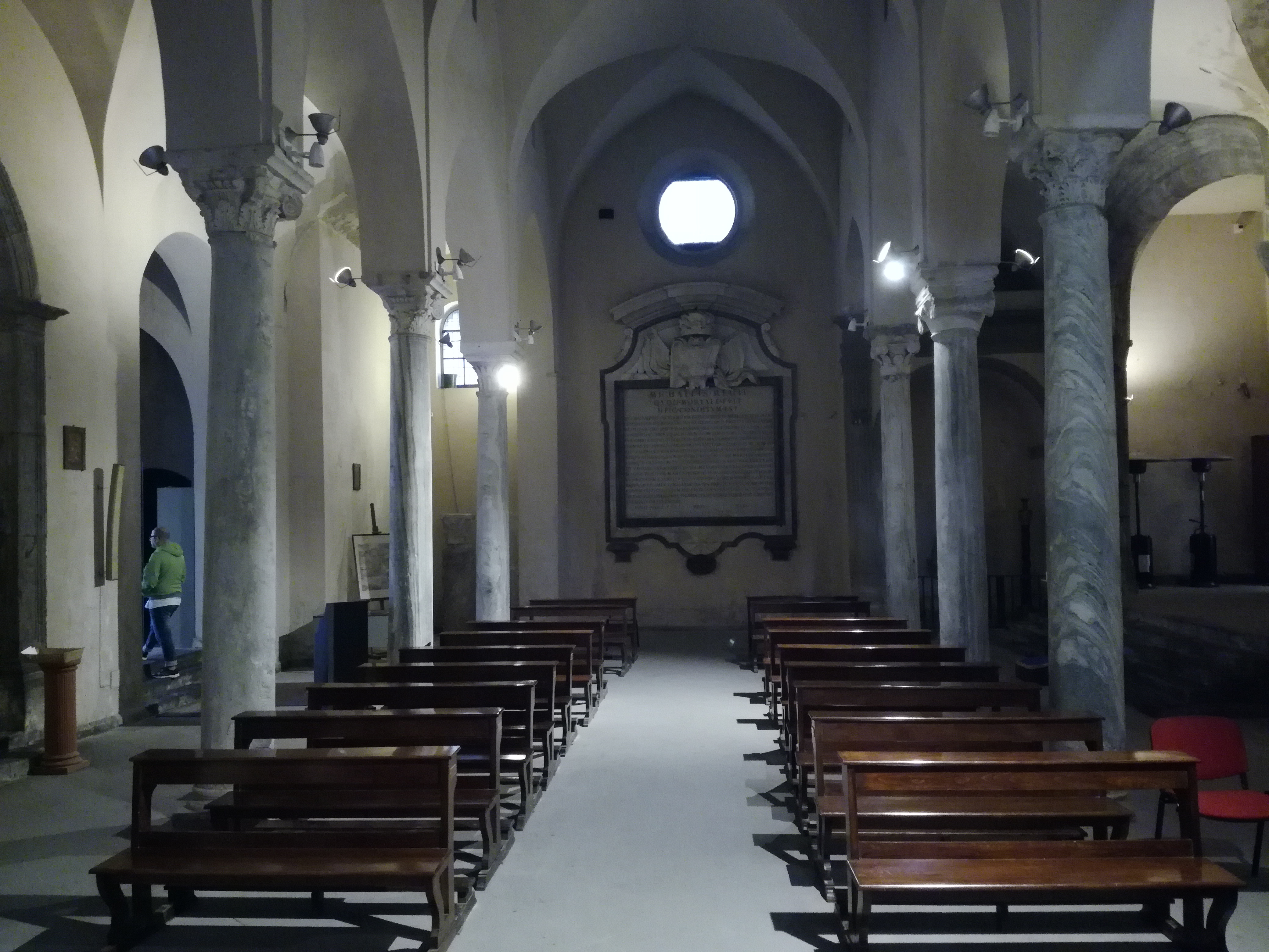 Interno, San Giovanni a Mare